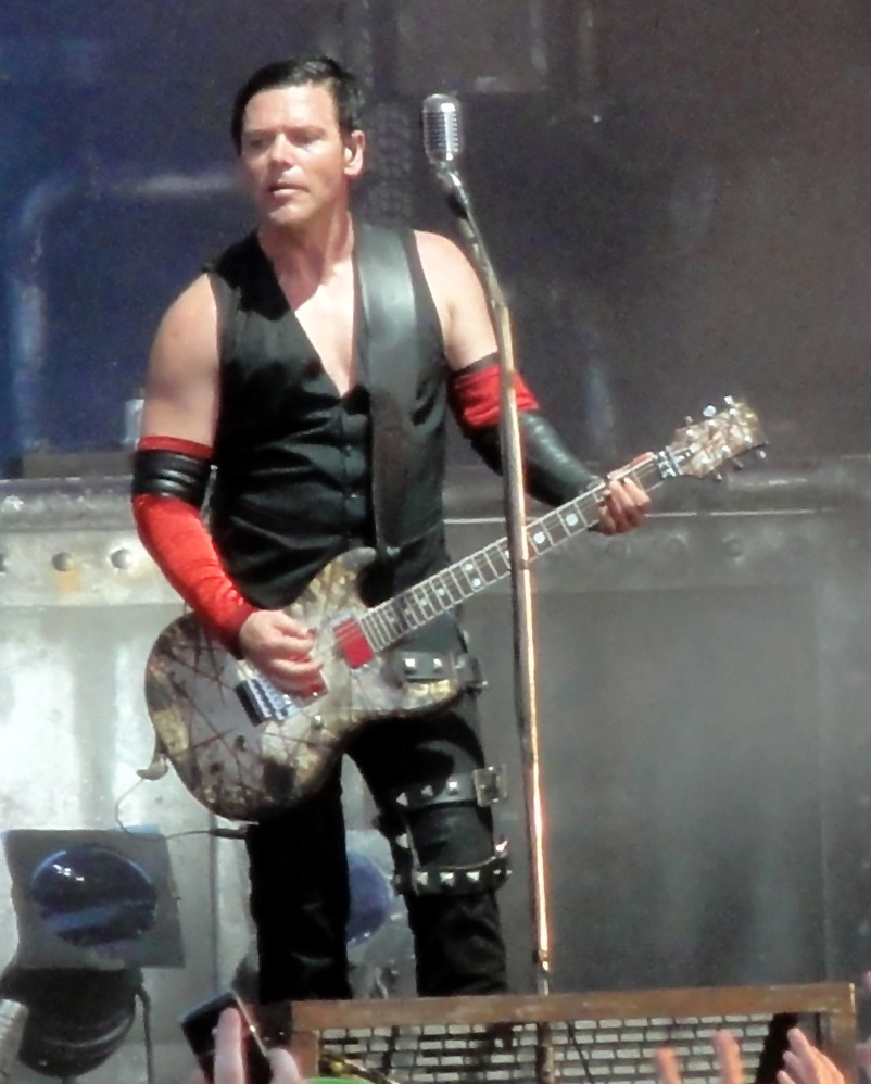 Rammstein